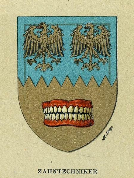 Wappen der Zahntechniker (Wappen der Wiener Gewerbegenossenschaften, um 1900)